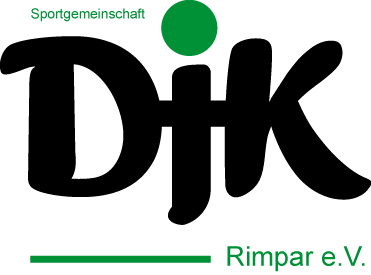 Logo des Vereins SG DJK Rimpar e.V.